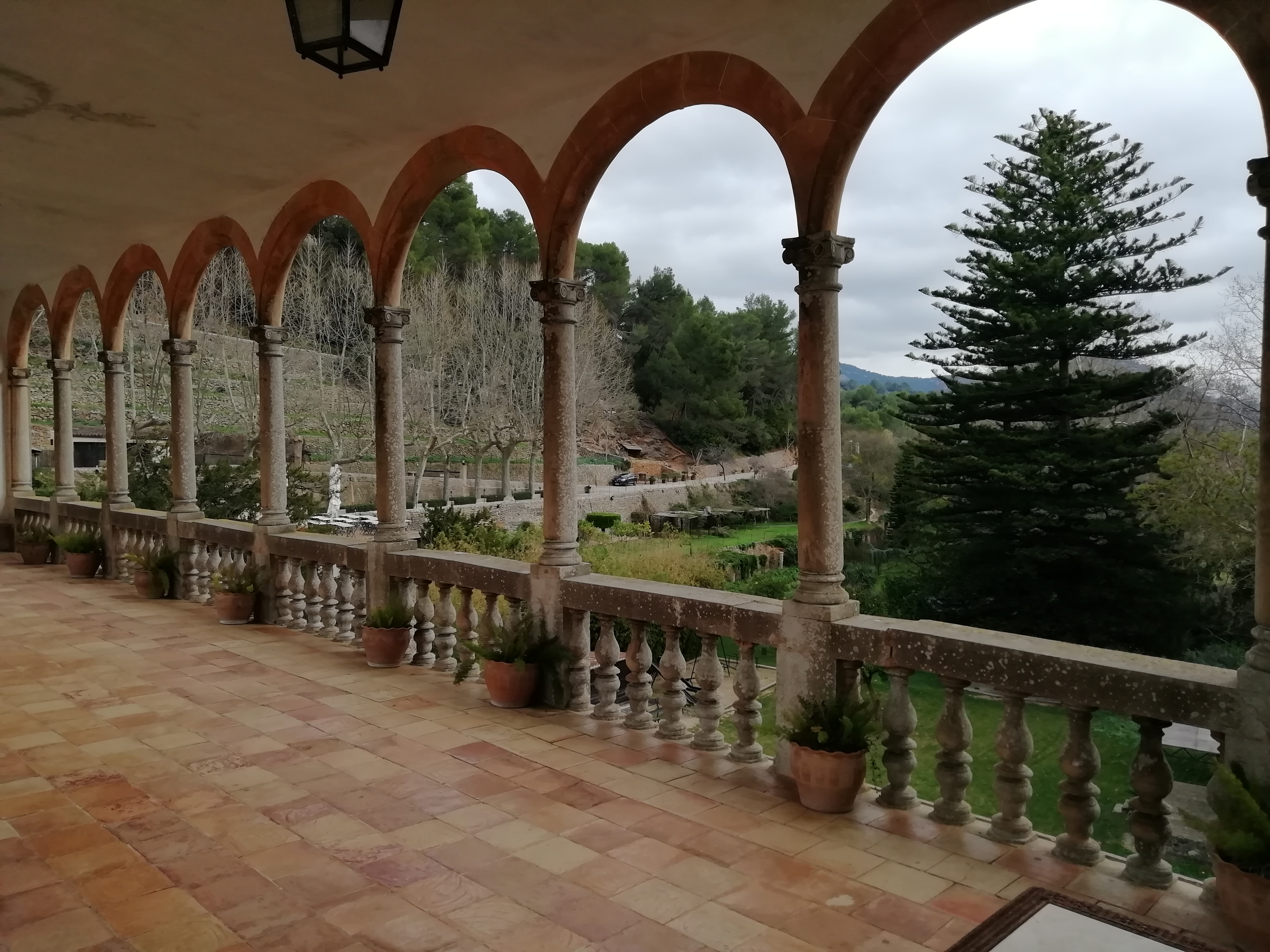 Patio interior de la finca Sa Granja, en Esporlas, Mallorca.